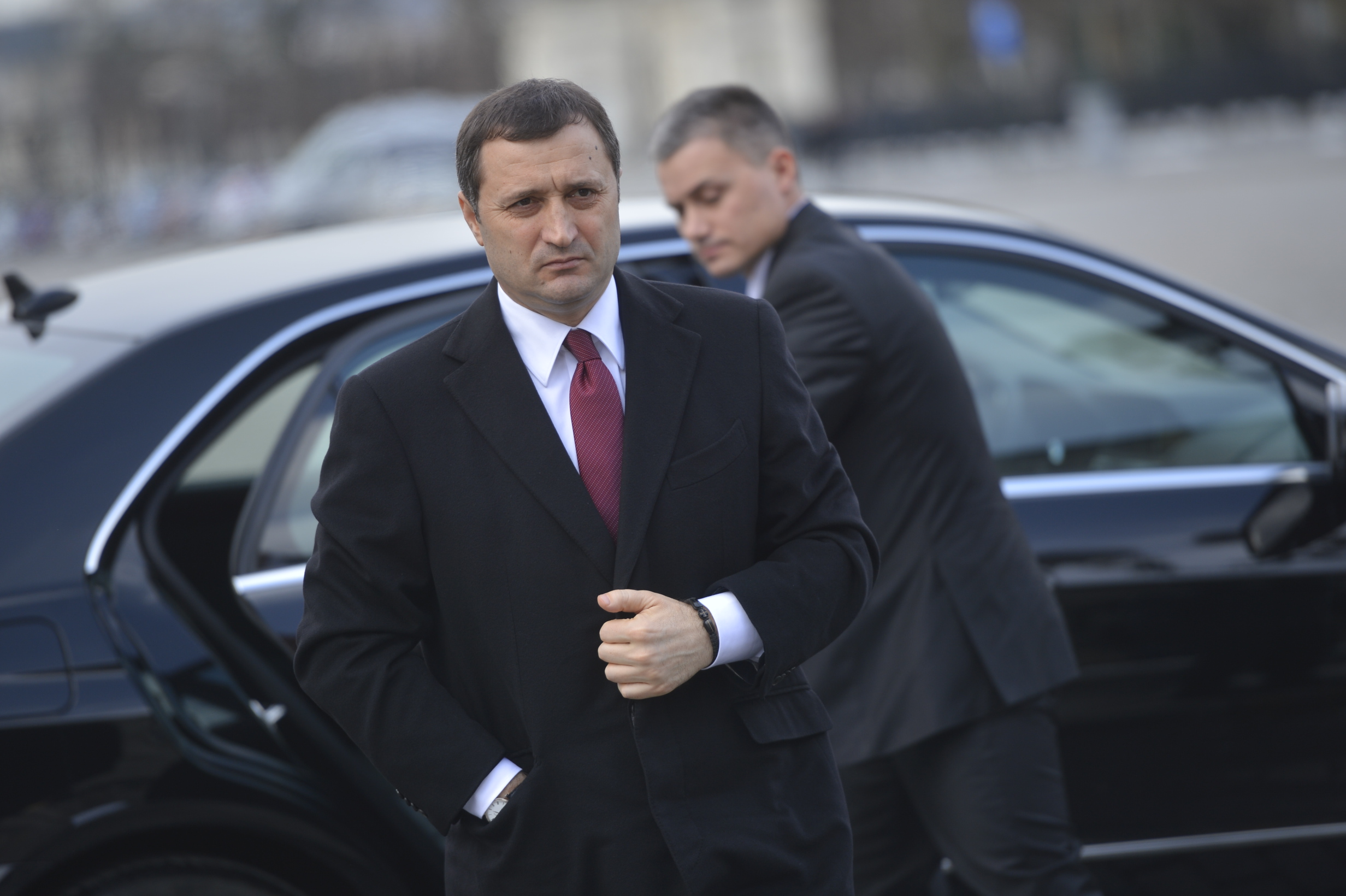 EPP Summit, 14 Mar. 2013